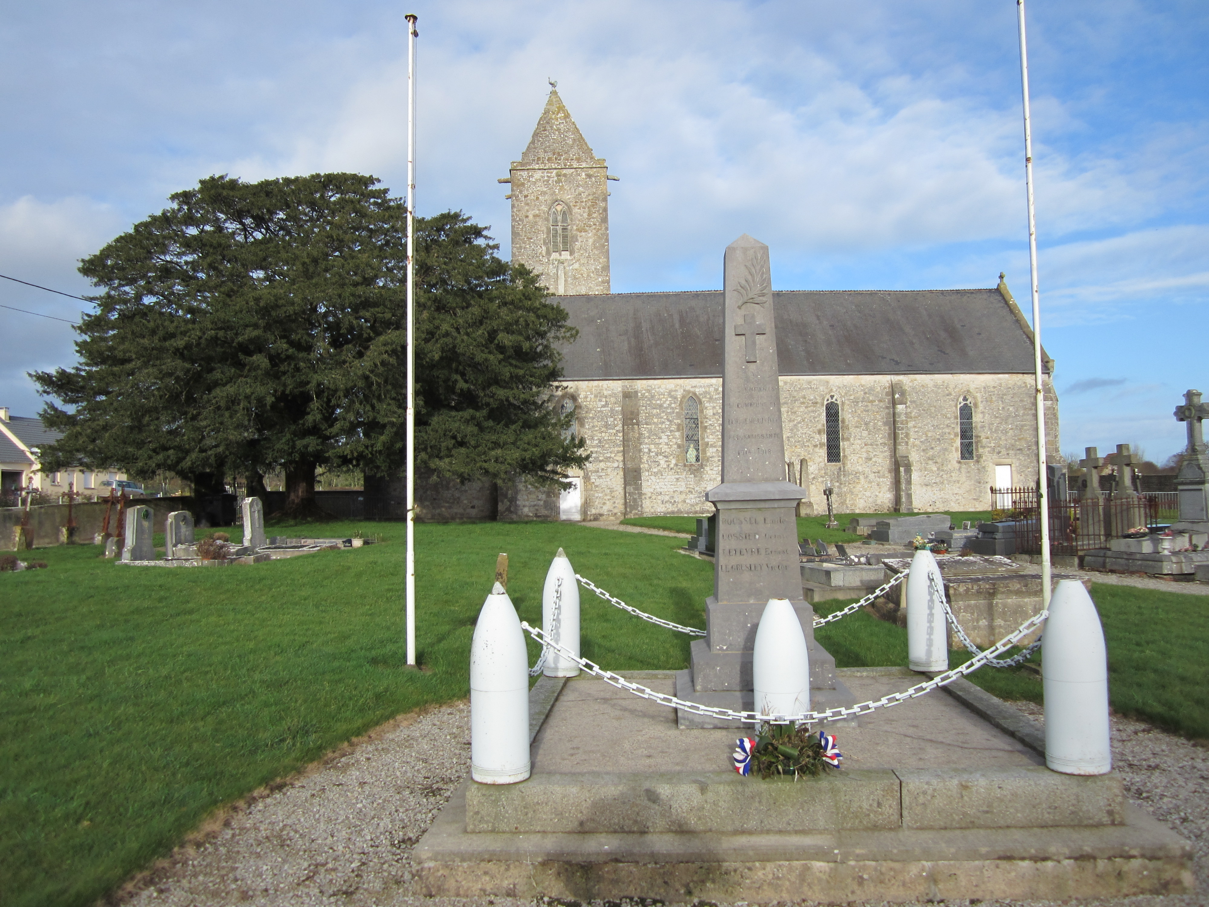 Église Saint-Laurent d'Écoquenéauville